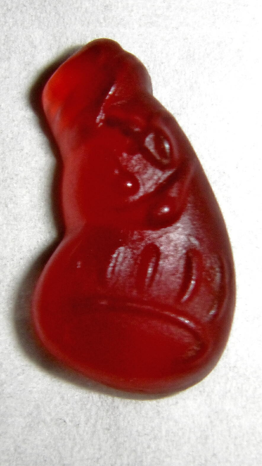 コーラアップ